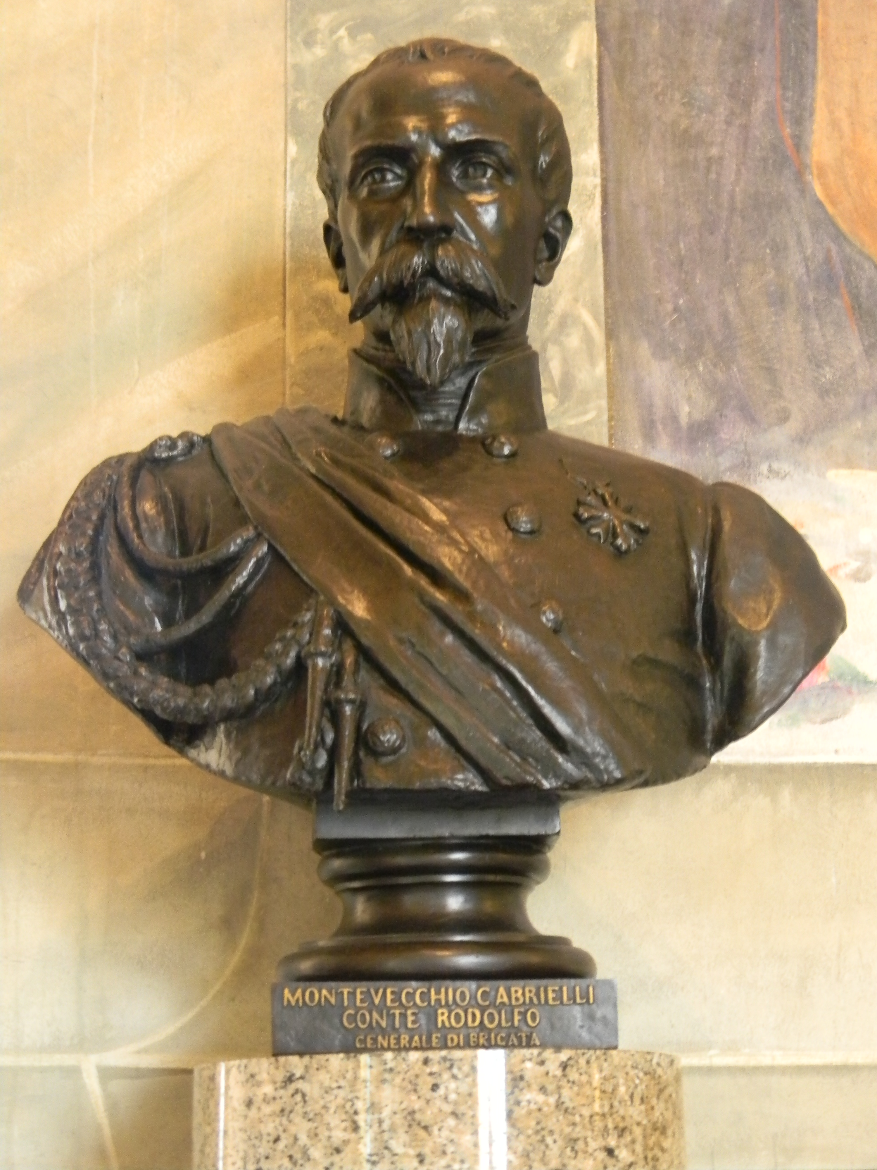 Rodolfo Gabrielli di Montevecchio, Général de Brigade. Buste depuis la tour de San Martino, Italie.